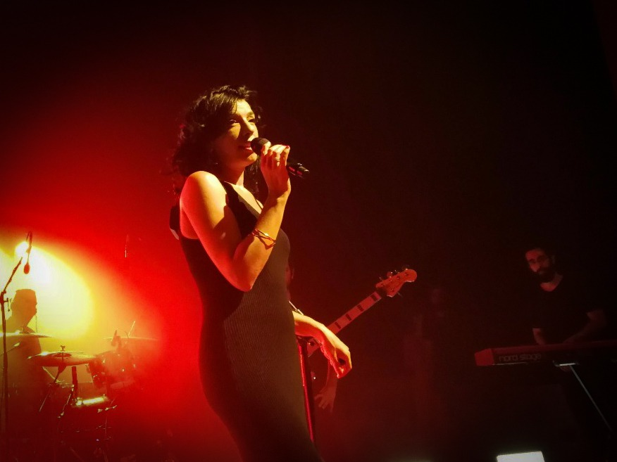 דקלה, בהופעה במועצה האזורית חוף הכרמל, ספטמבר 2018